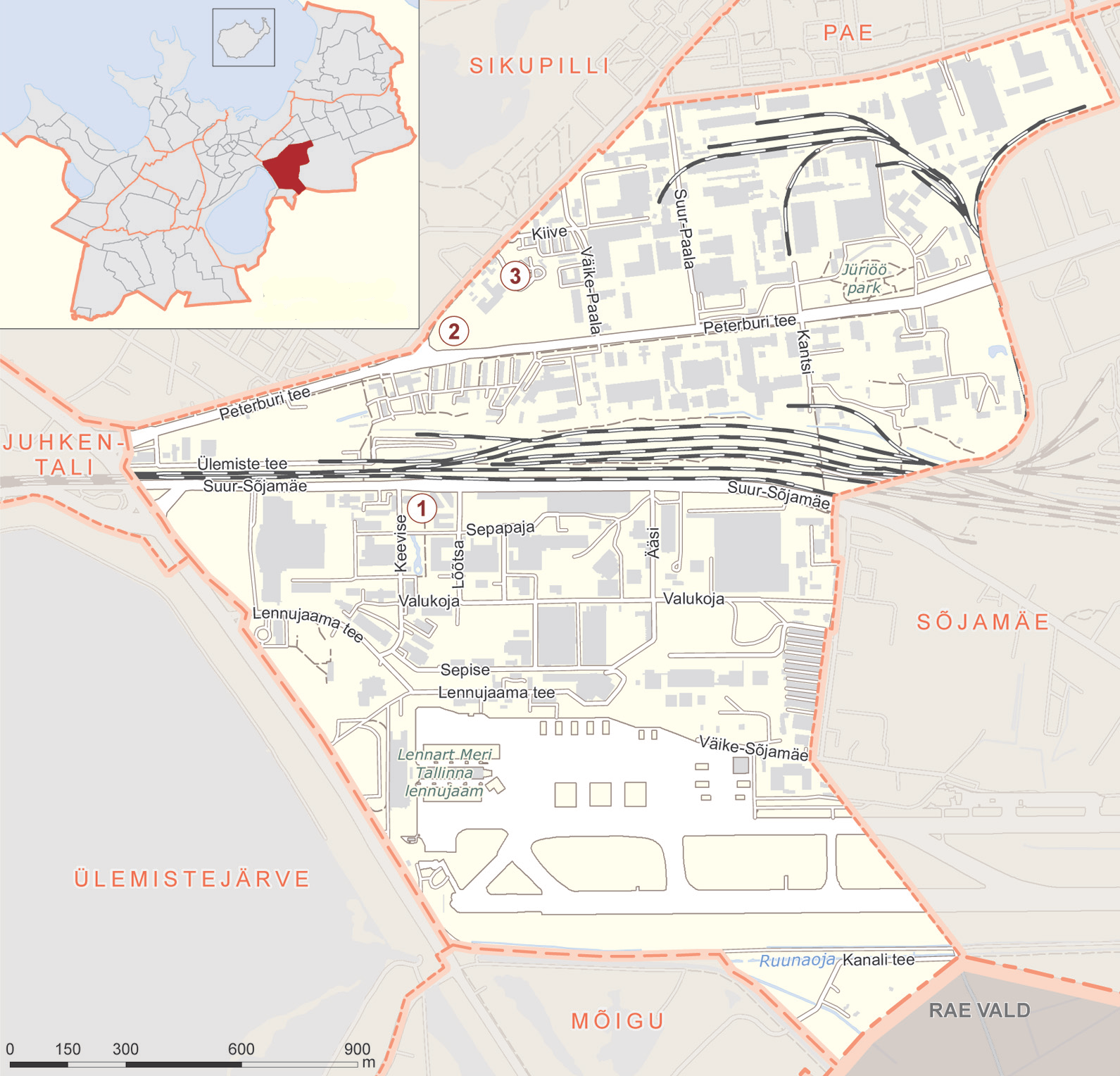 Ülemiste asumi kaart